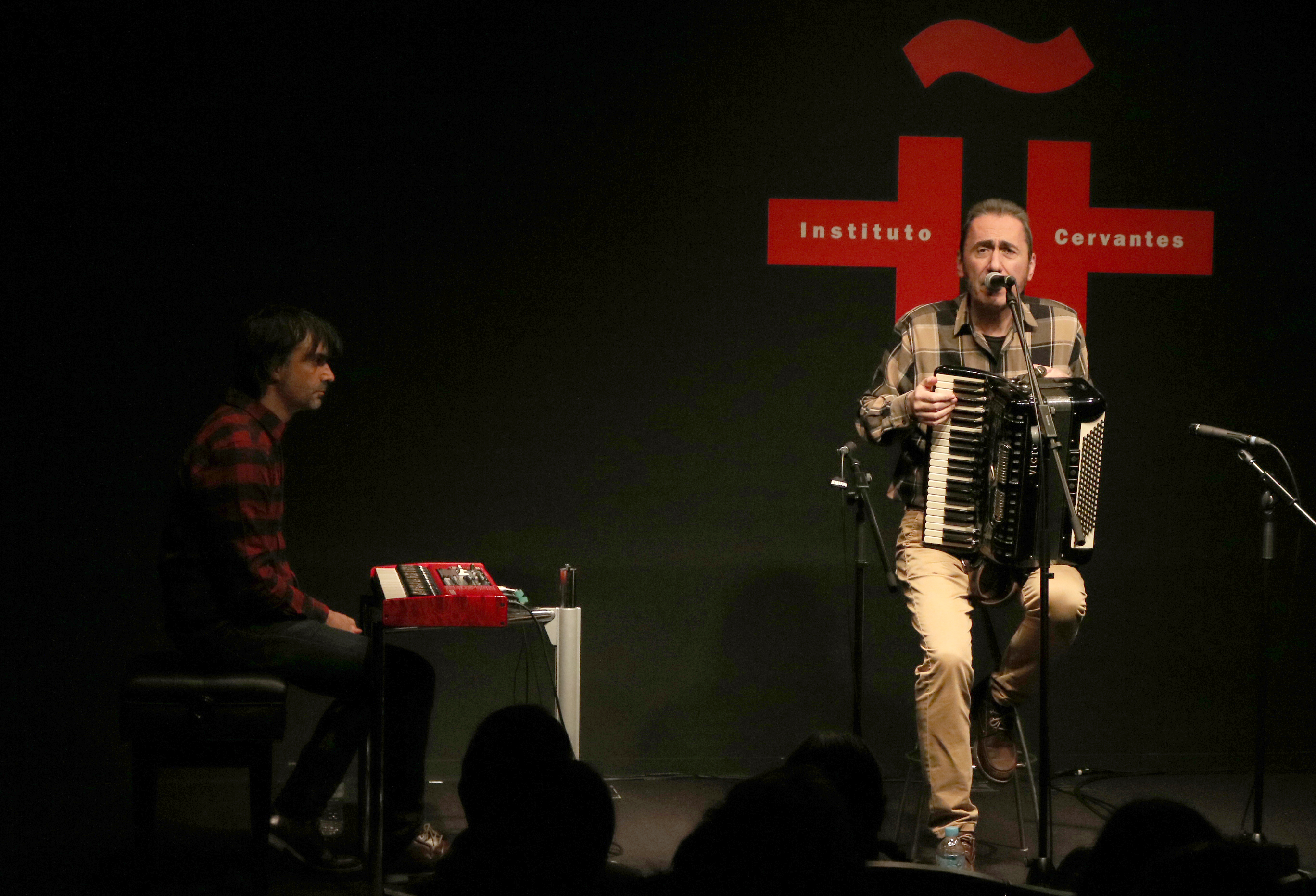 “Tonetti anaiak” (Los hermanos Tonetti) da nombre al último disco de Jabier Muguruza, el que hace el número 14 en su carrera de canción de autor, y que presentará en nuestro centro. A través de un estilo muy cercano al jazz, y acompañado al piano por Mikel Azpiroz el autor nos cantará al oído esas hermosas historias que nos reencuentran con lo más íntimo de nosotros mismos.